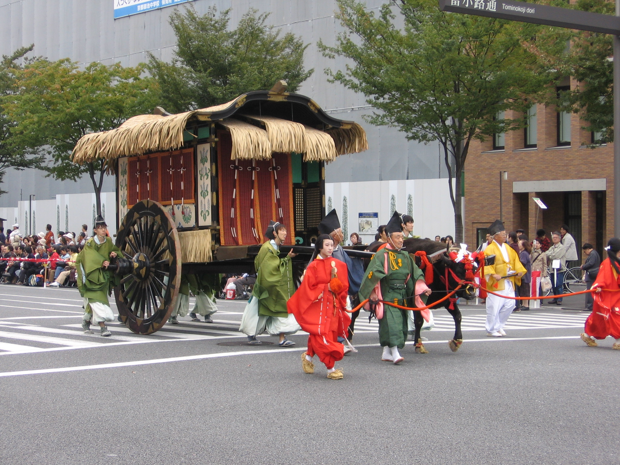 Photo prise lors du Jidai Matsuri à Kyoto (photo personnelle de l'auteur)